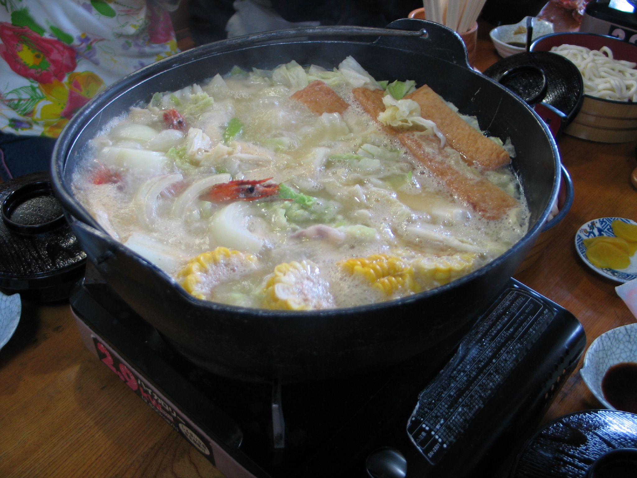 在騎過協力車與自行車之後，四位老人家將這麼大一鍋的石狩全部吃完，還包括桌上的配料等等。外公、外婆更是各吃2碗飯呢！